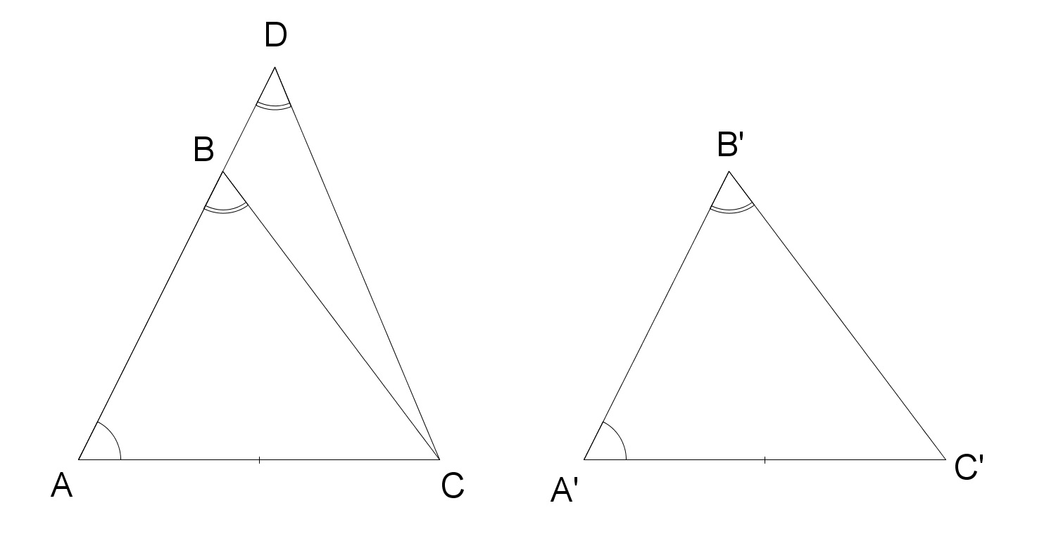 Imagem suporte para demonstração